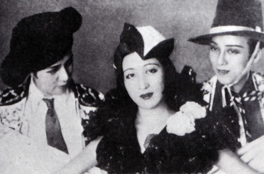 レビュー『タンゴ・ローザ』の宣材写真